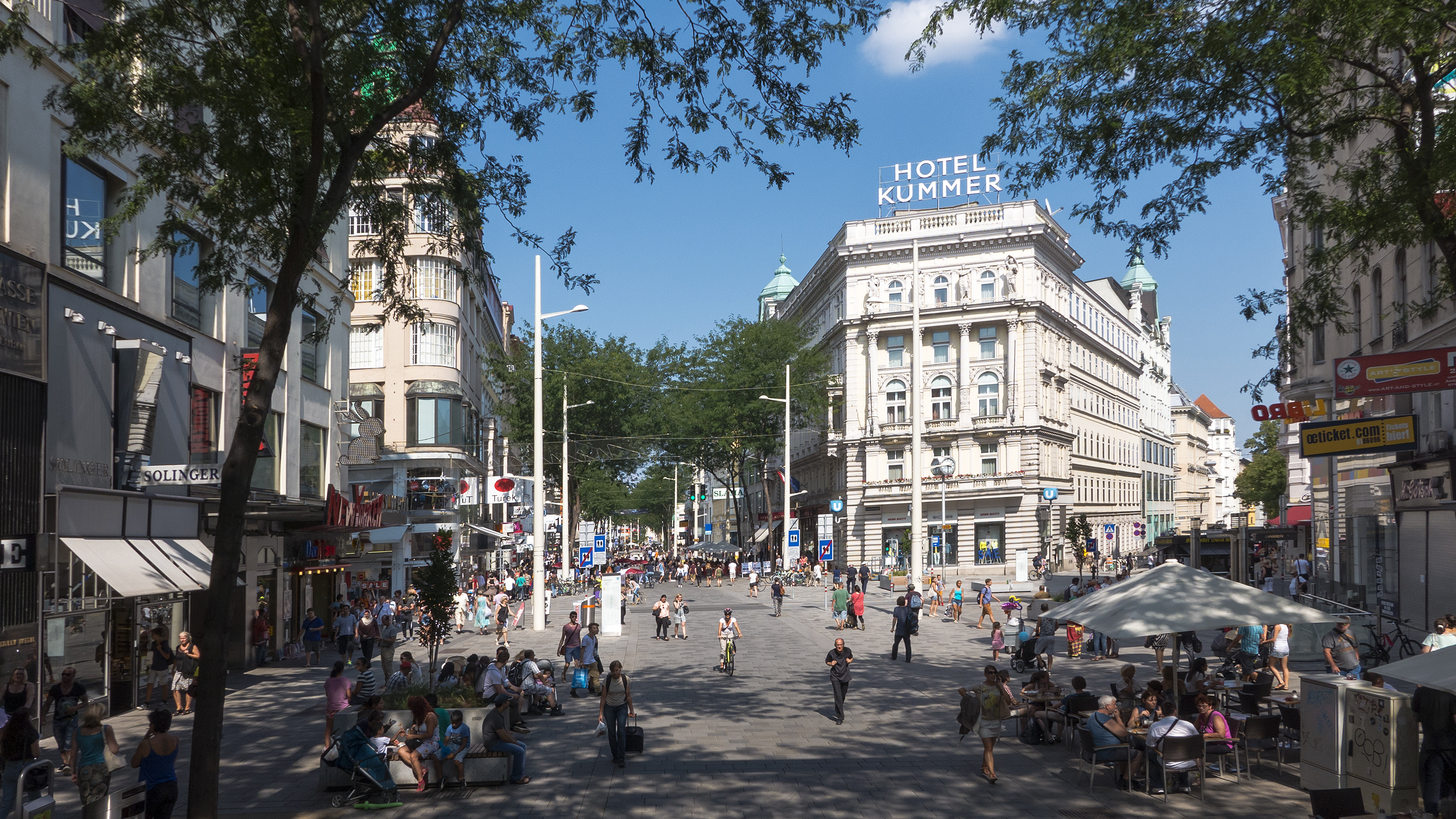 Shopping in der Mariahilfer Straße bei Nr. 70 in Wien 7